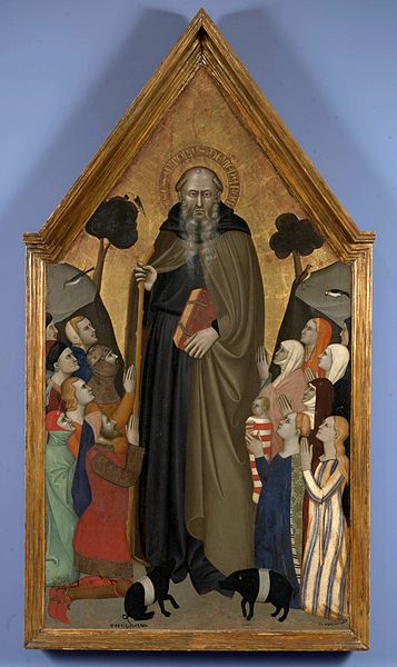 Pinacoteca civica Bruno Molajoli